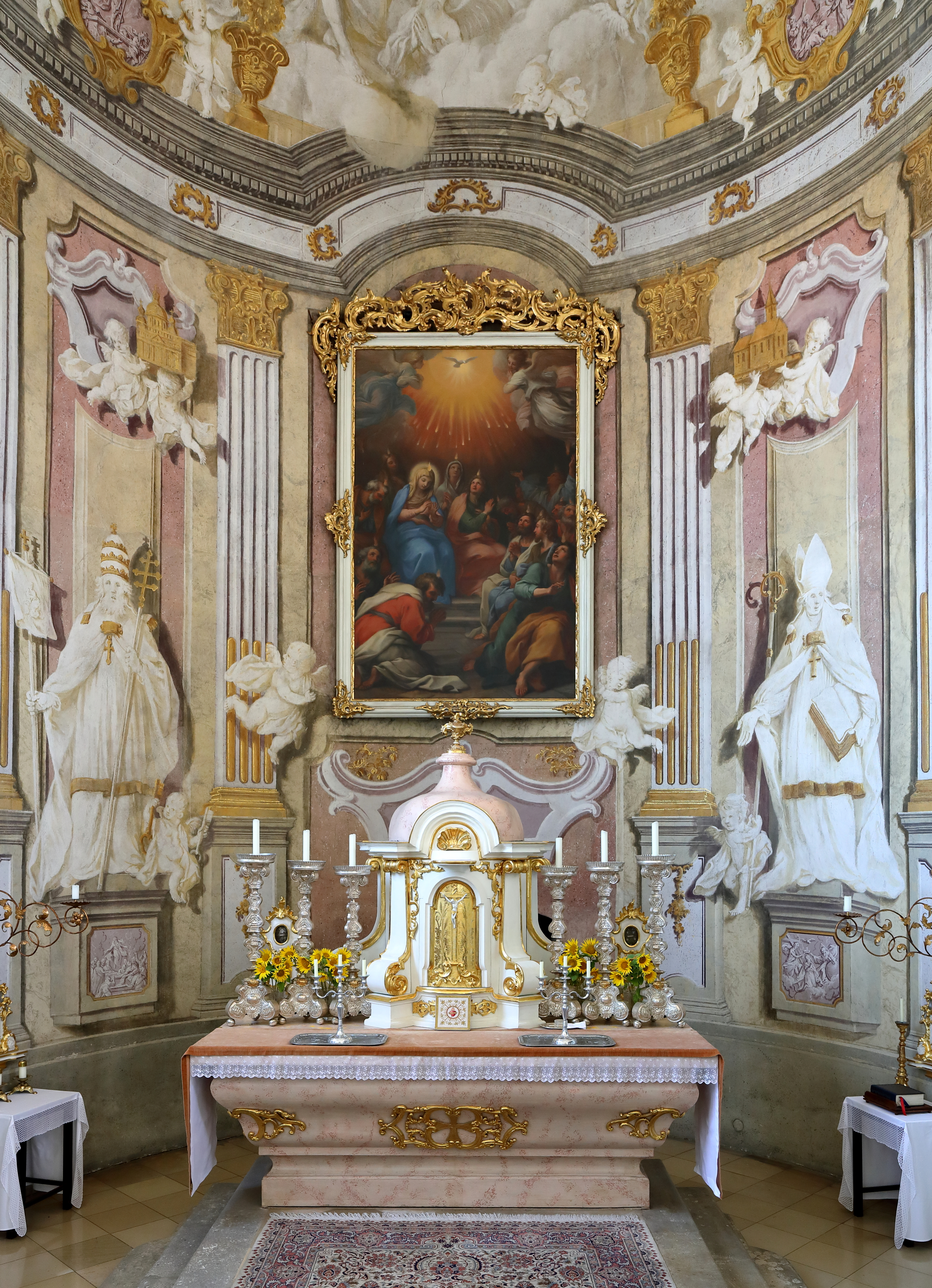 Hochaltar der Wallfahrts- und Pfarrkirche Mariä Geburt in Maria Roggendorf, ein Ortsteil der niederösterreichischen Marktgemeinde Wullersdorf.Der Hochaltar ist eine freskierte Scheinarchitektur, inklusive den Heiligen Gregor der Große und Altmann von Passau. Das Altarbild „Herabkunft des Heiligen Geistes“ ist von Andreas Rudroff, dem auch die Fresken zugeschrieben werden.